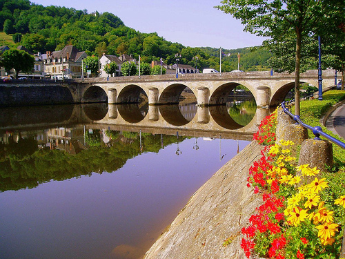 Le Pont neuf - Terrasson-Lavilledieu